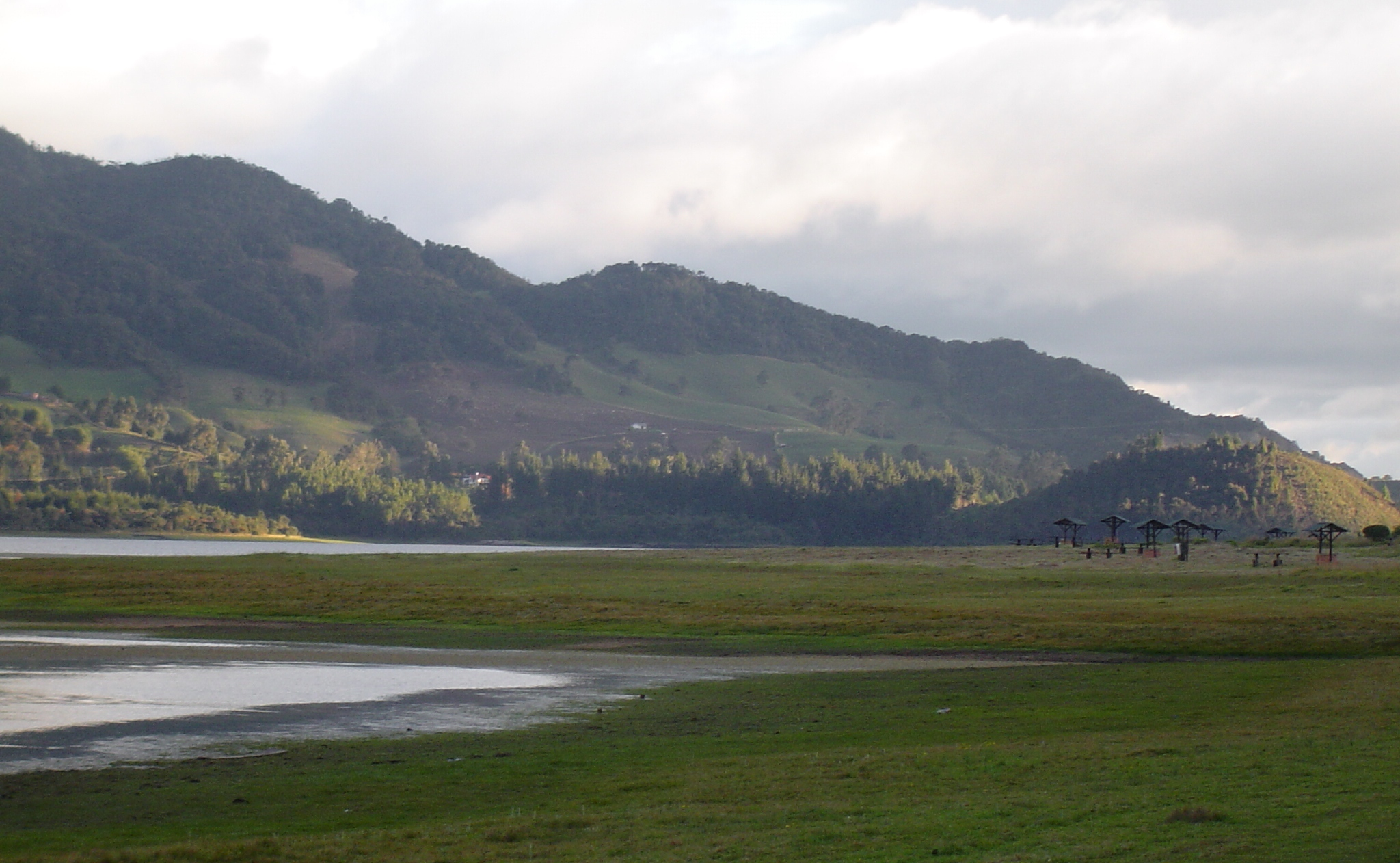 Sabana de Bogotá en las inmediaciones del embalse del Neusa.